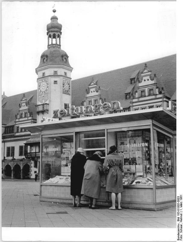 Leipzig, Markt, Zeitungskiosk Zentralbild Schaar 1.3.1961 Gal-Le. Frühjahrsmesse 1961. Leipzig bereitet sich auf den Besucherstrom vor. UBz: Moderner Zeitungskiosk auf dem Markt.